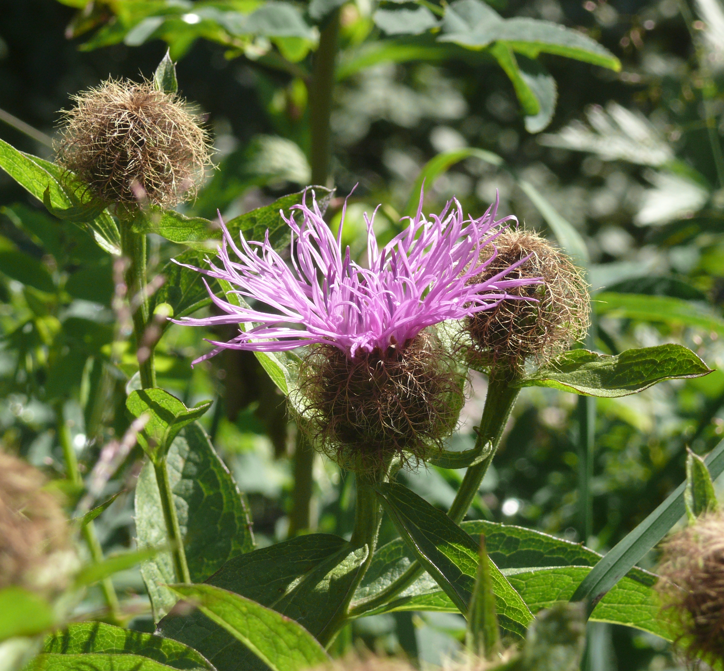 Centaurea phrygia subsp. pseudophrygia, Allgäuer Alpen, Deutschland